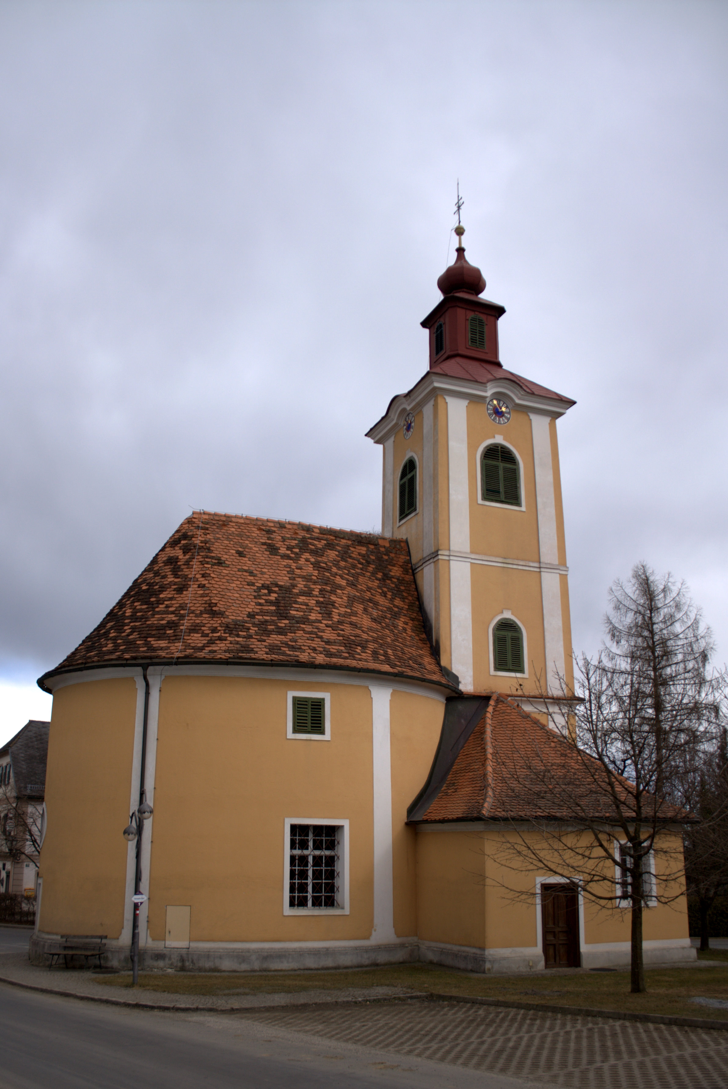 Auffen Kath. Wallfahrtskirche zur Schmerzhaften Maria